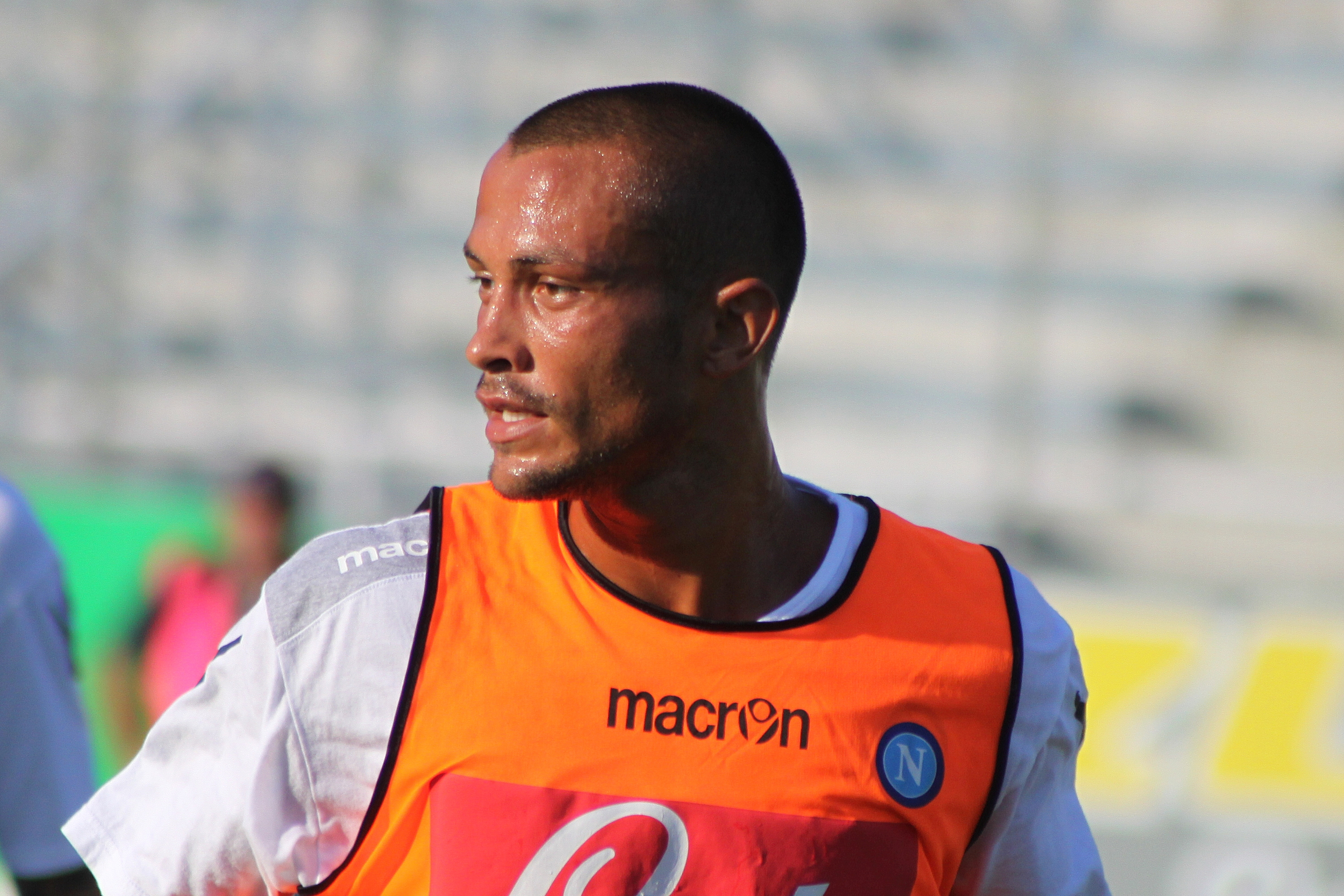 Inácio Piá - SSC Neapel (2) Inácio Piá - Società Sportiva Calcio Napoli